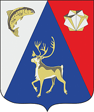 Герб Ловозерского района Мурманской области